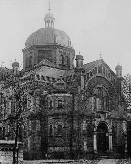 alte Synagoge in Steele, heute Stadtteil der Stadt Essen; am 14. September 1883 geweiht, in der Pogromnacht 1938 ausgebrannt und danach abgerissen